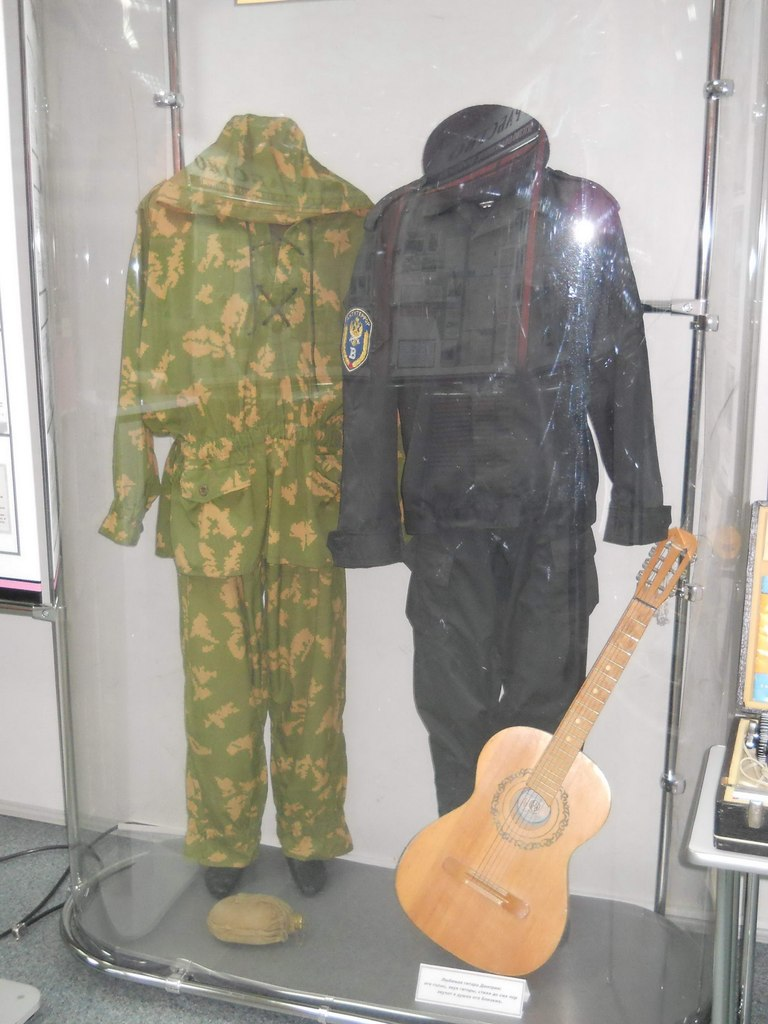 due uniformi appartenute all'Eroe della Federazione Russa Tenente Colonnello Dimitry Razumovsky morto in azione il 3 settembre 2004 a Beslan, Ossezia del Nord.